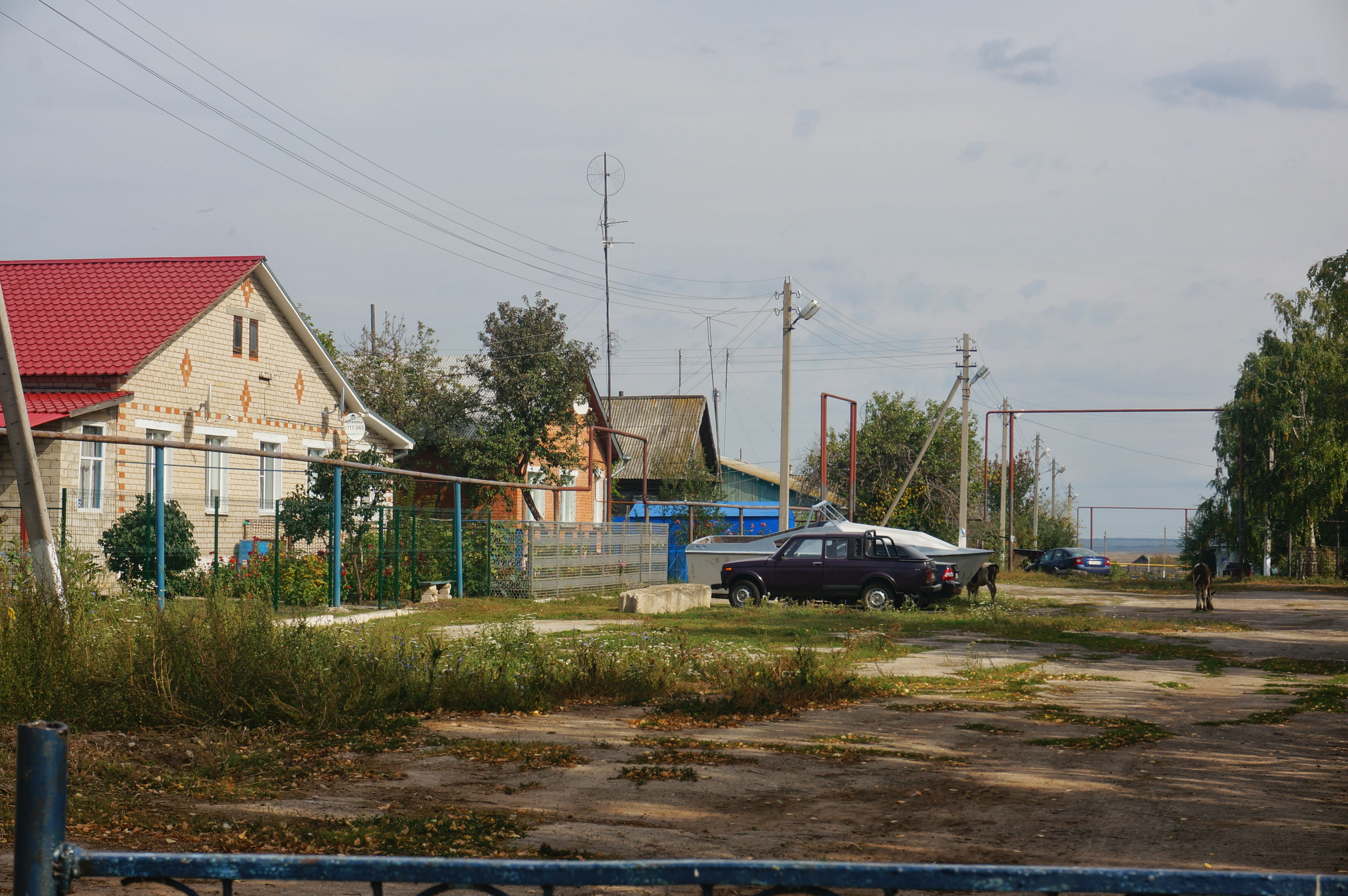 Кирилловка, Ставропольский район Самарской области, Россия